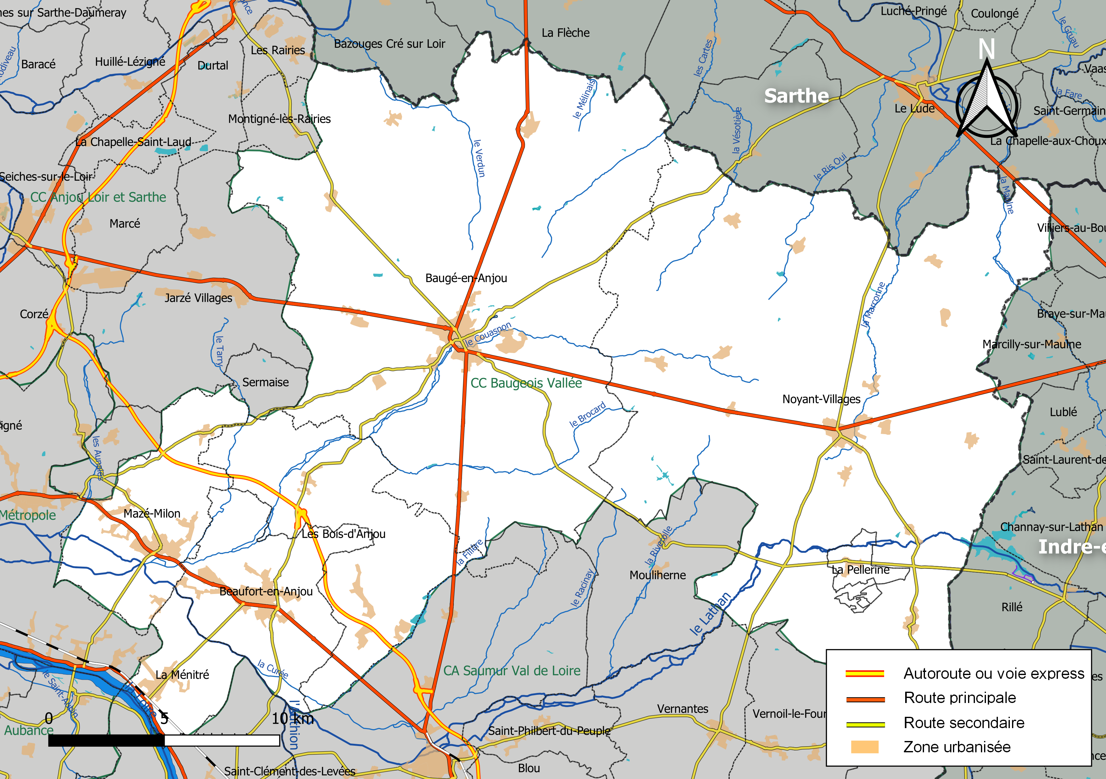 Carte géographique de la Communauté de communes Baugeois Vallée, département de Maine-et-Loire, France. Composition au 1er janvier 2019.